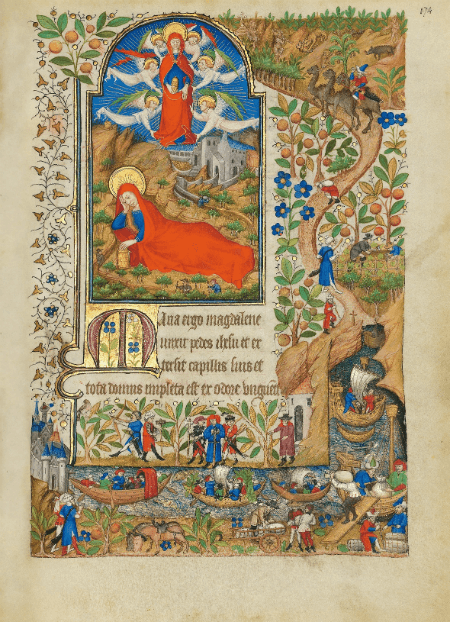 Folio 174r aus dem faksimilierten Stundenbuch der Margarete von Orléans (1. Hälfte 15. Jahrhundert) mit einer Miniatur der Maria Magdalena als Büßerin und der Darstellung einer belebten Hafenszene in der Bordüre